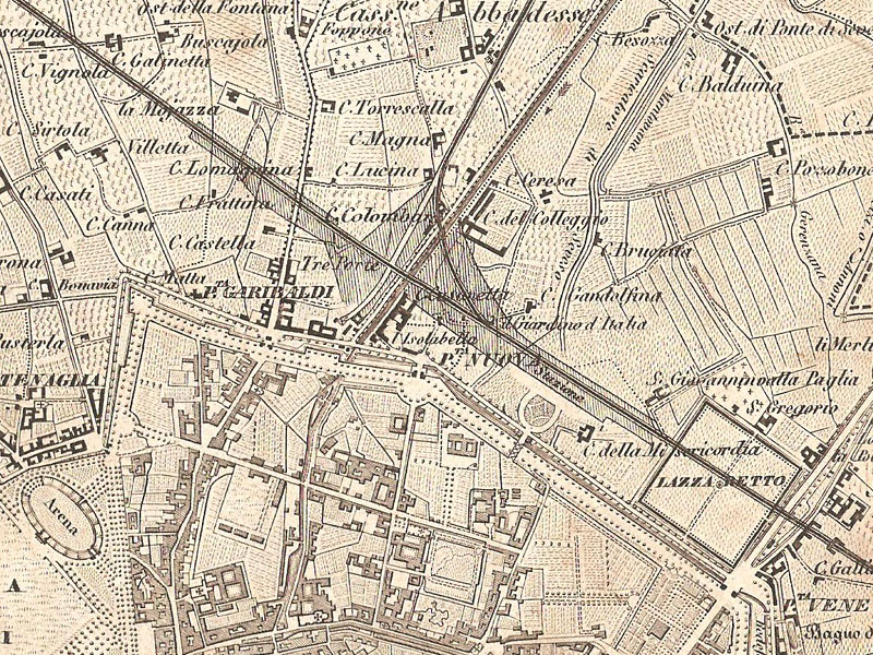 Carta di Milano, Giovanni Brenna (1865), dettaglio della Stazione Centrale